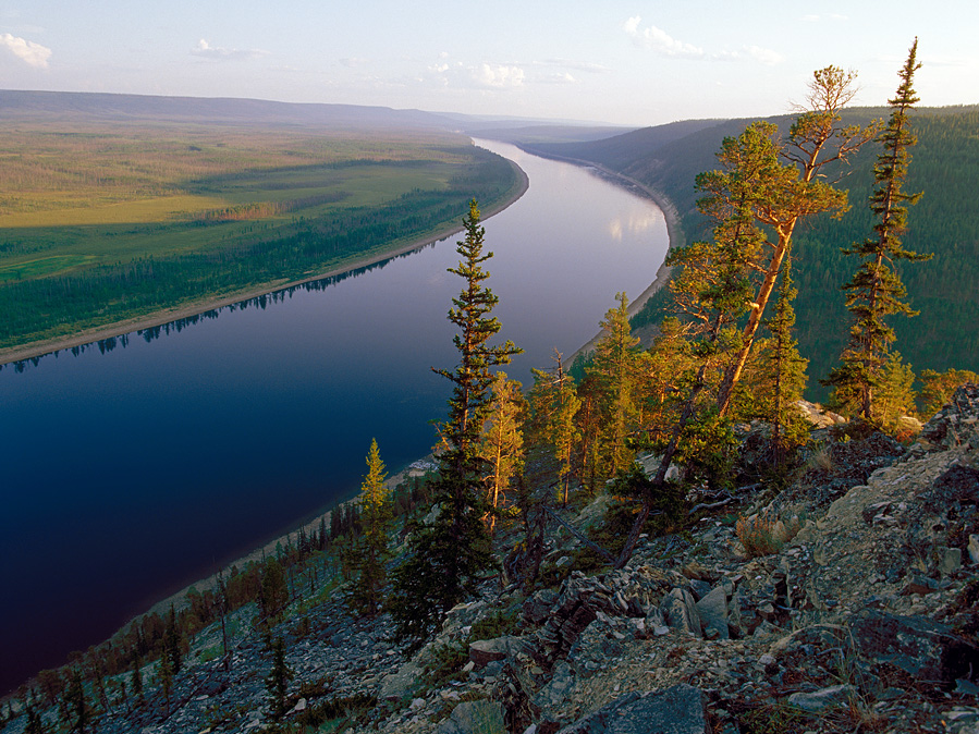 Река Олёкма. Олёкминский заповедник